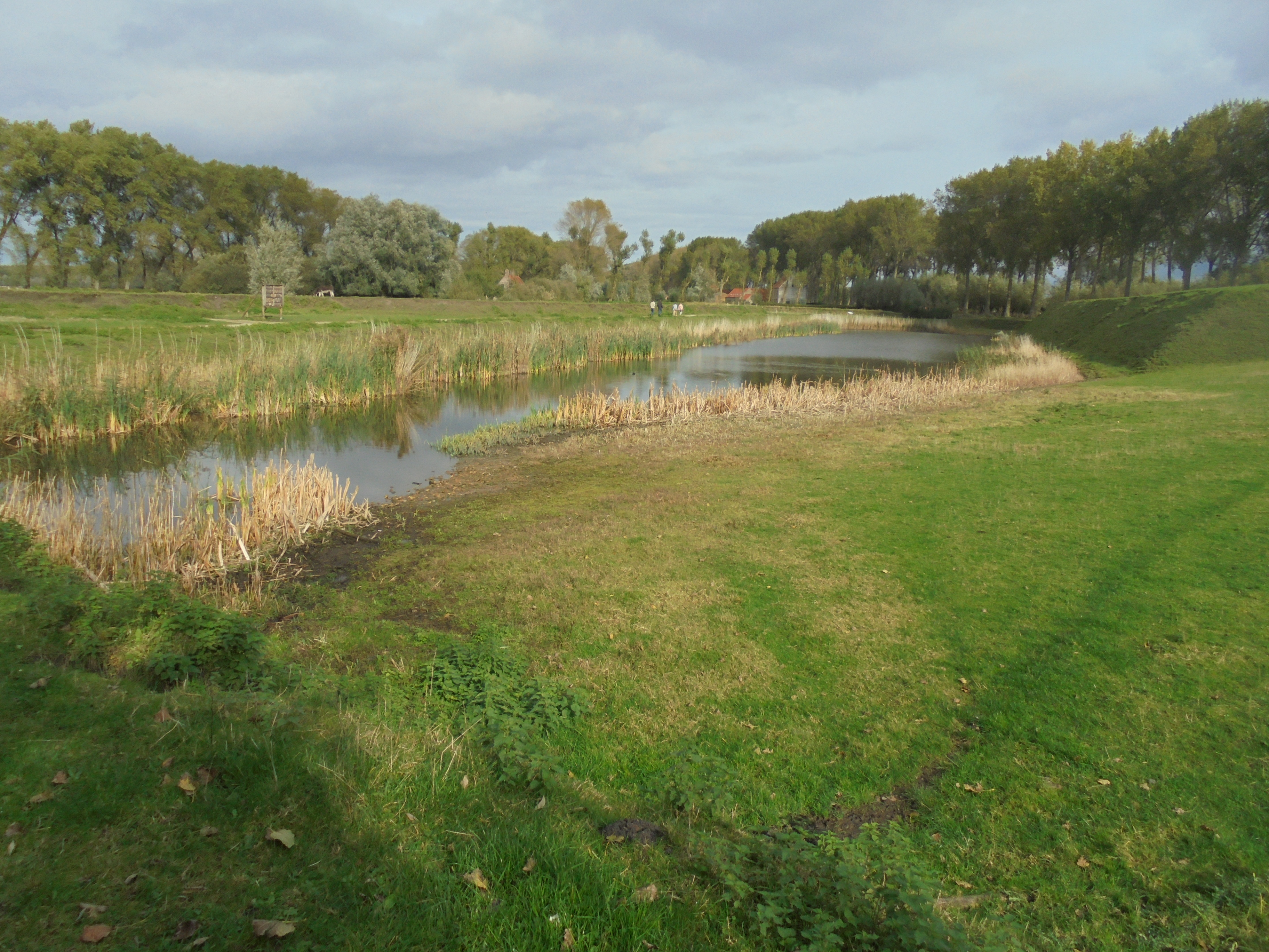 Stadswallen - Damme - West-Vlaanderen - België